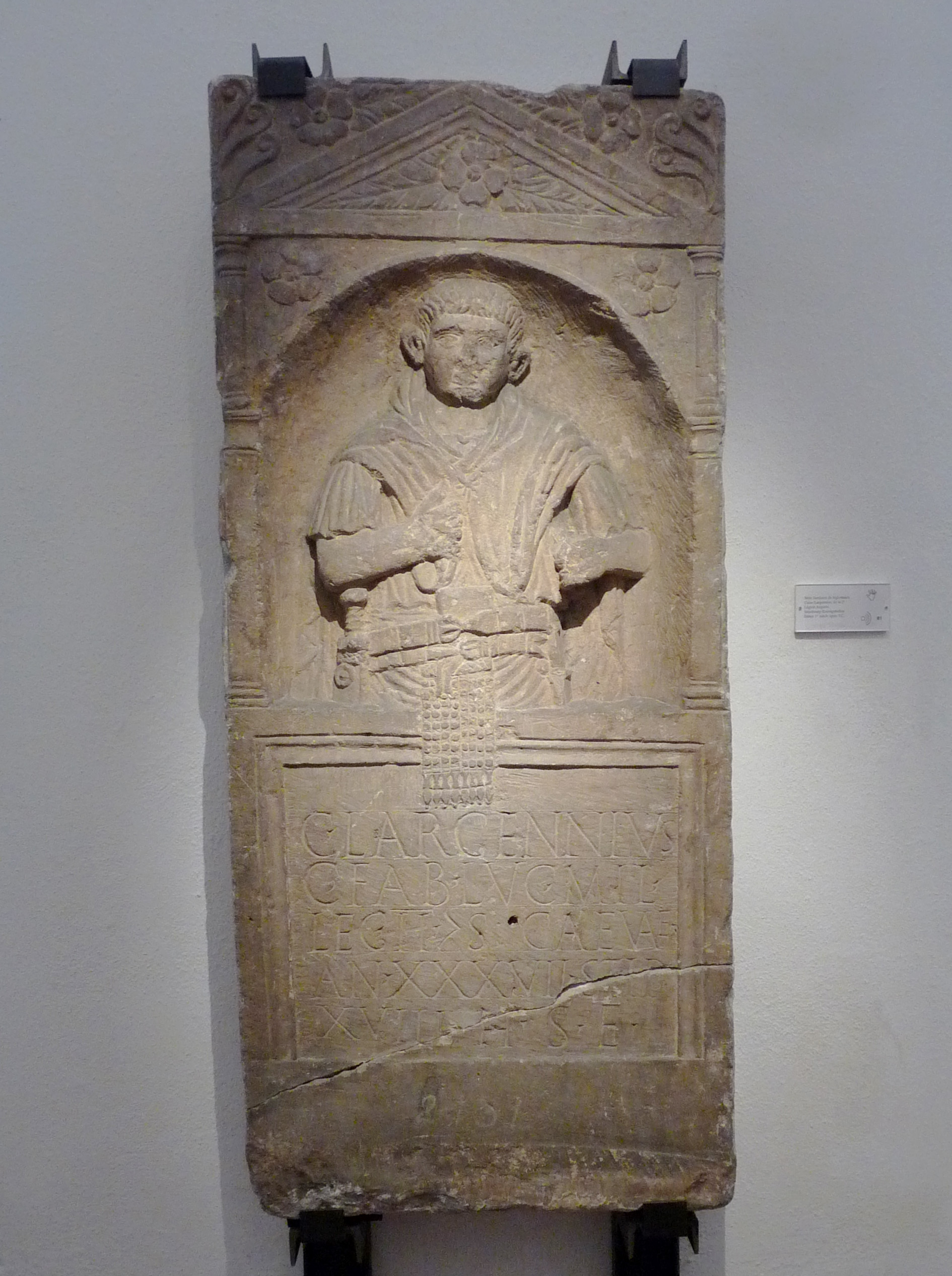 Stèle funéraire du légionnaire Caius Largennius, de la 2e Légion Auguste, trouvée à Strasbourg-Koenigshoffen, début du 1er siècle après JC. CIL XIII 5978: C(aius) Largennius/ C(ai filius) Fab(ia) Luc(a) mil(es)/ leg(ionis) II ) (centuria) Scaevae/ an(norum) XXXVII stip(endiorum)/ XVIII h(ic) s(itus) e(st)